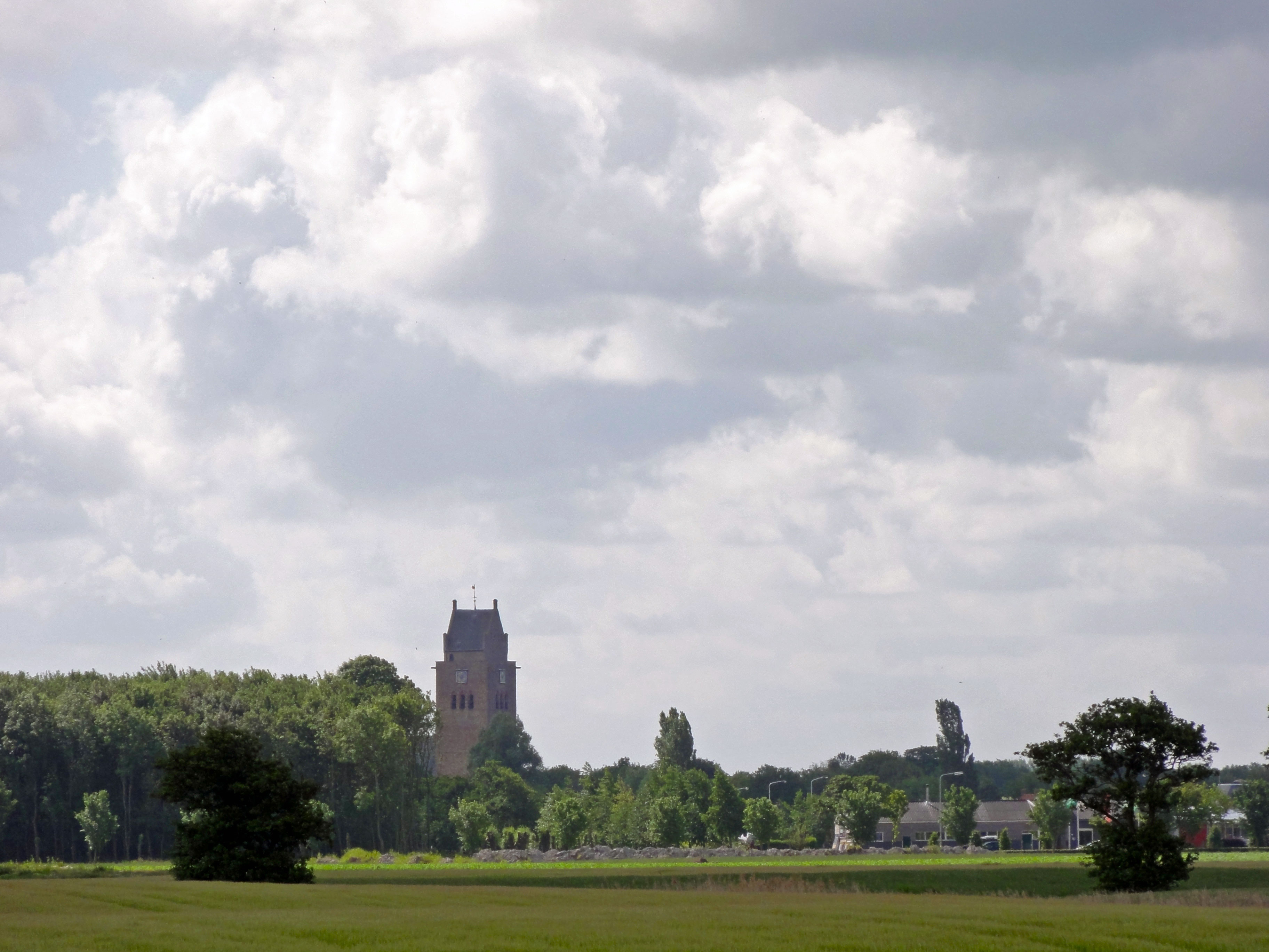 Zicht op Minnertsga